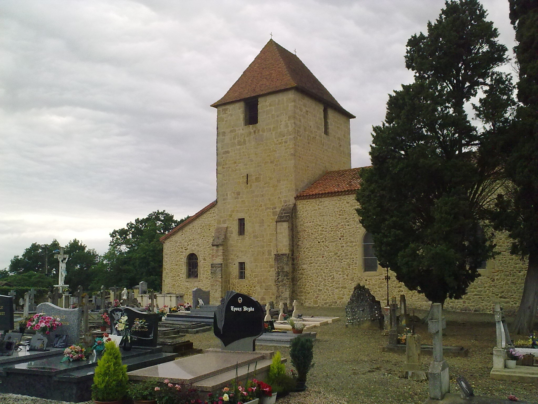 Projan